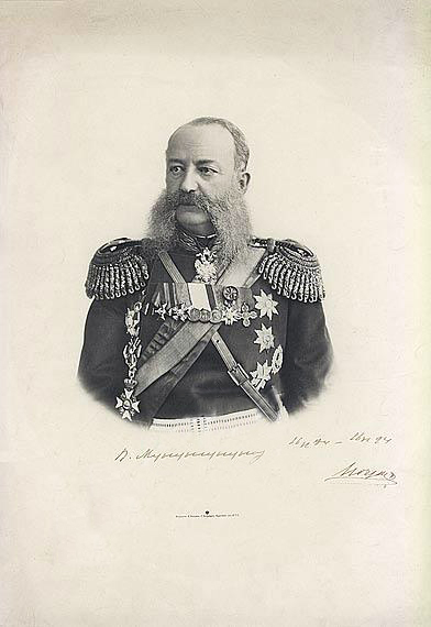 Фототипия. Безак Николай Александрович (1836-1897 гг.). Начальник Главного Управления почт и телеграфов (31 августа 1882 г. - 22 июля 1895 г.). XIX в. РИ, г. Санкт-Петербург. Фотобумага матовая, фотопечать. 485х380